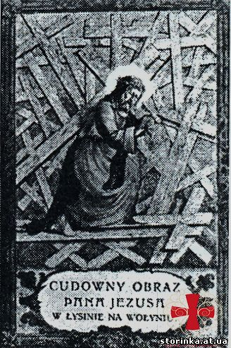 Чудотворний образ Христос Лисинський. Ікона зберігались в с. Лисині. Фото 1930 р